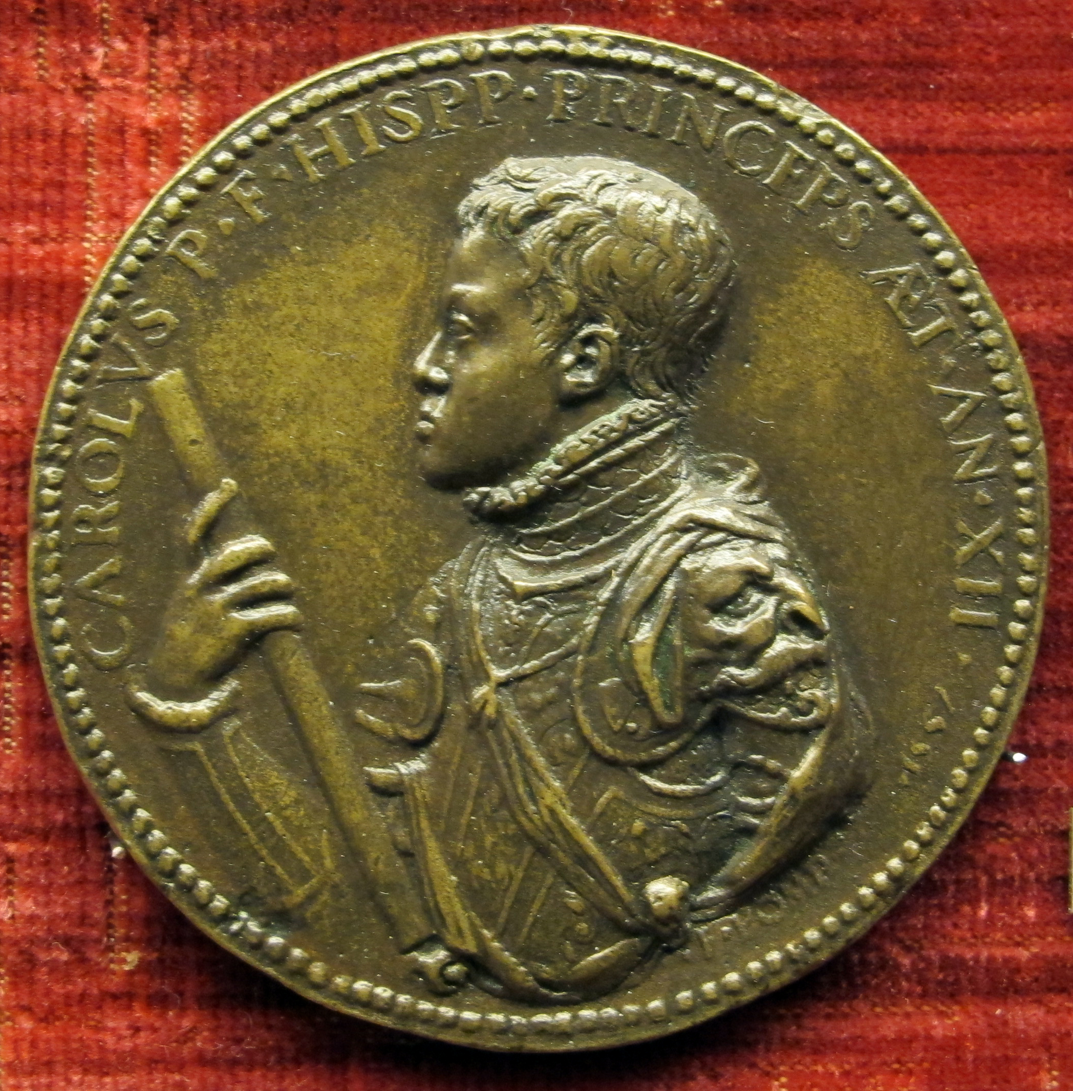 Medaglia di don carlos infante di spagna